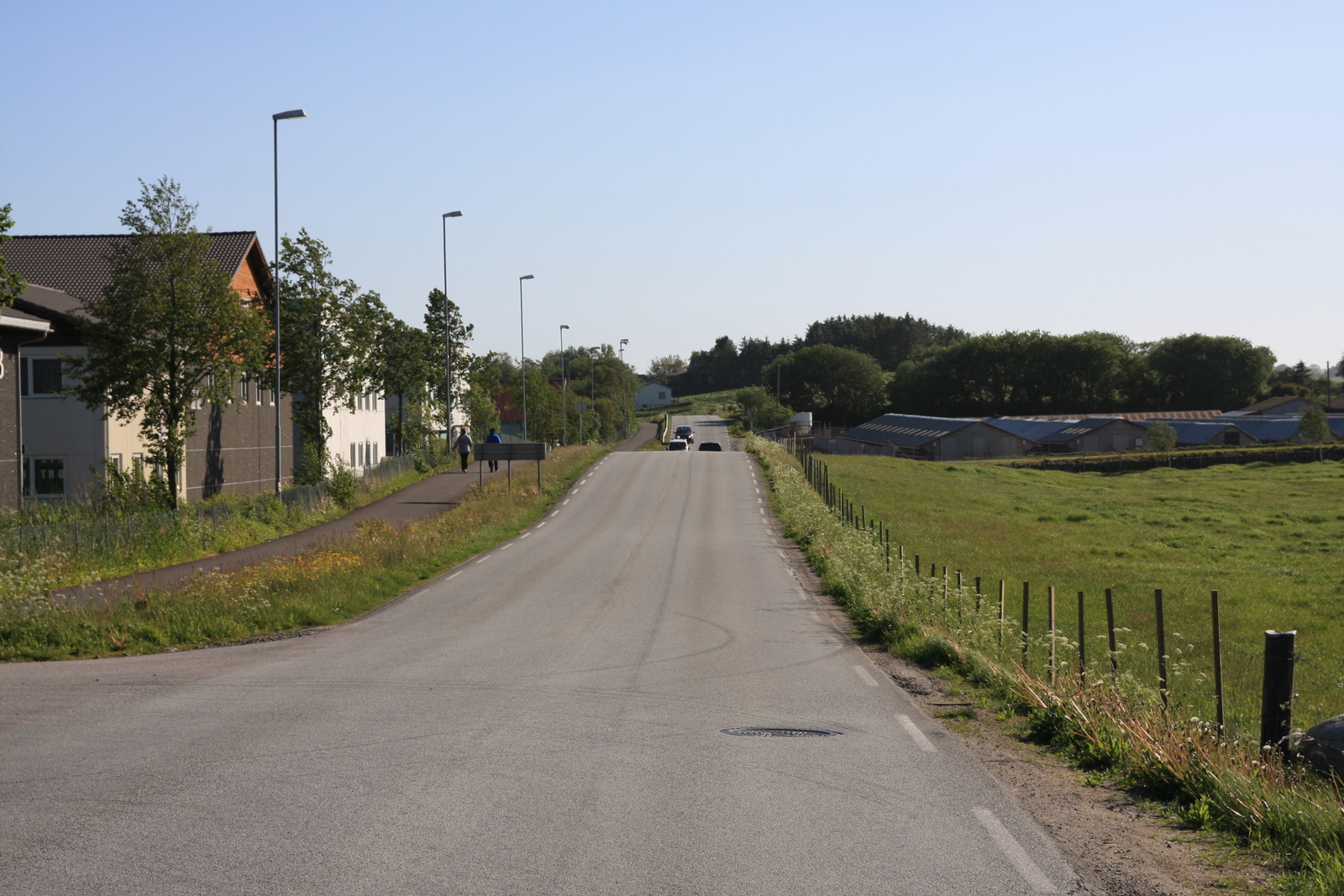 Fylkesvei 261 ved krysset Bedriftsvegen